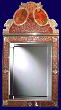 Schneewittchenspiegel im Schloss zu Lohr selbst fotografiert + bearbeitet